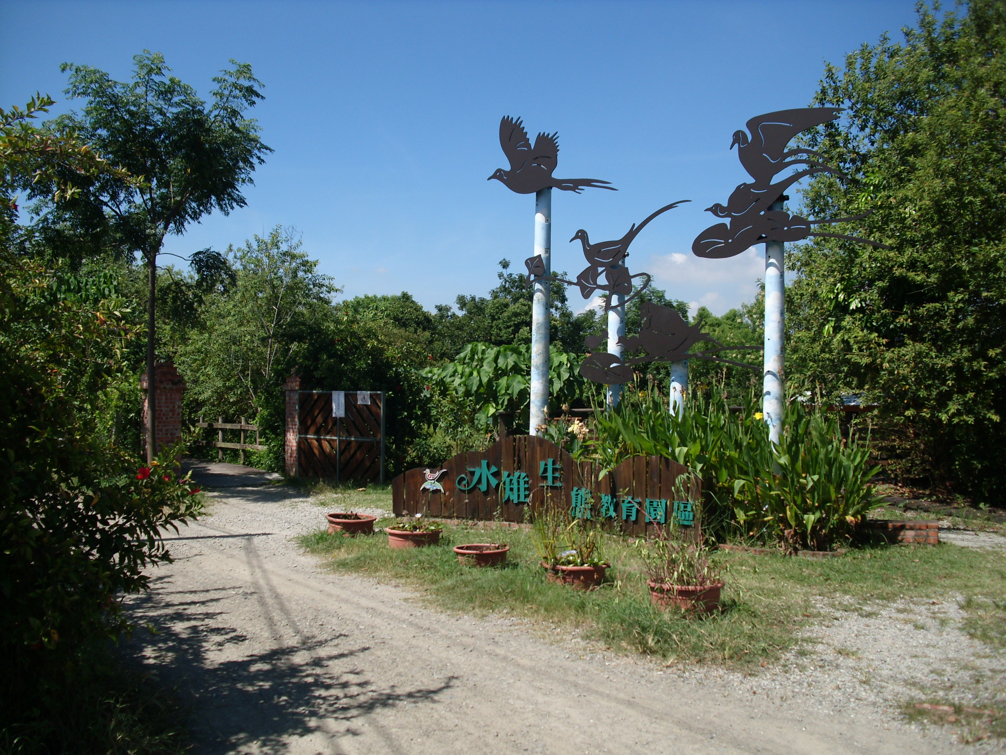 Bân-lâm-gú: 佇臺南官田的水雉（菱角鳥）生態教育園區，。